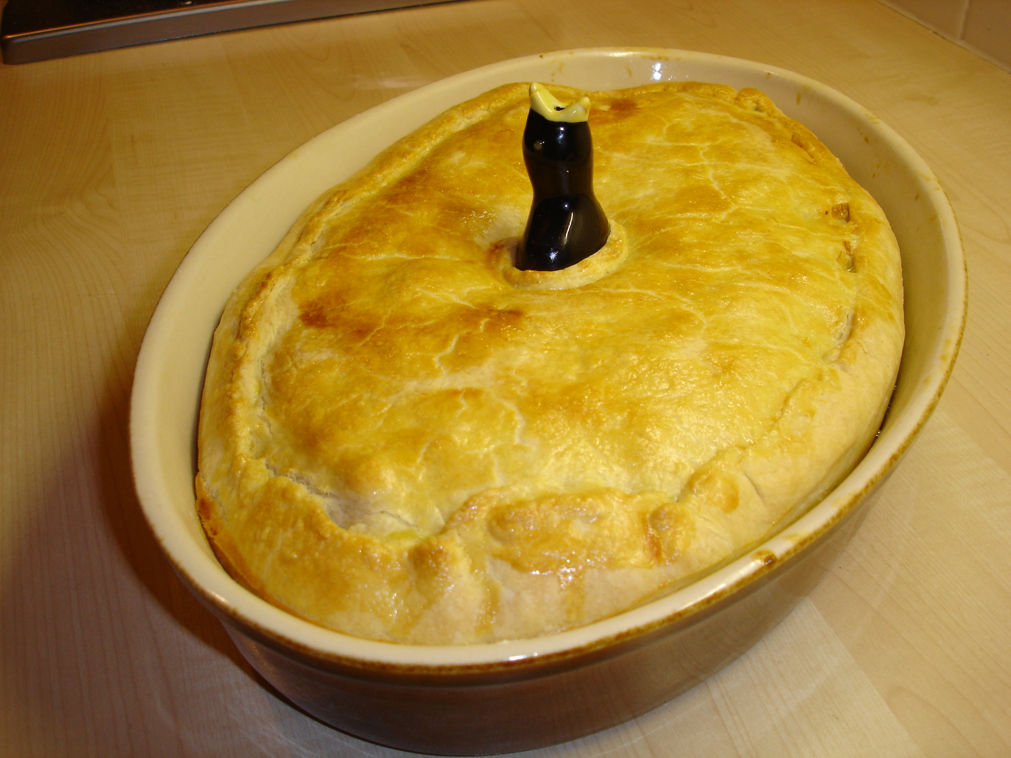 chicken pie